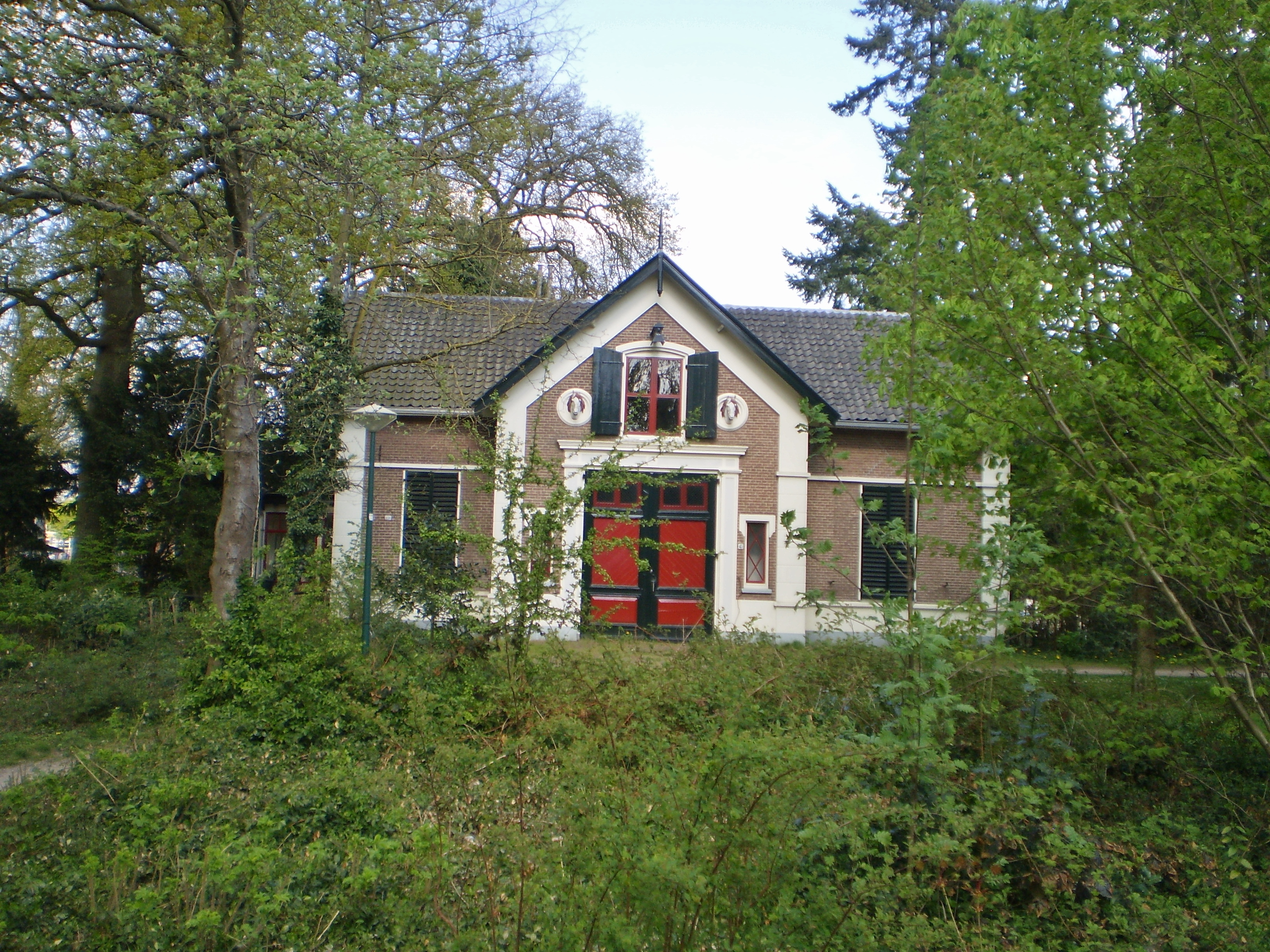 Koetshuis in de Pekingtuin van Baarn. Let ook op de paardenkoppen naast de deur